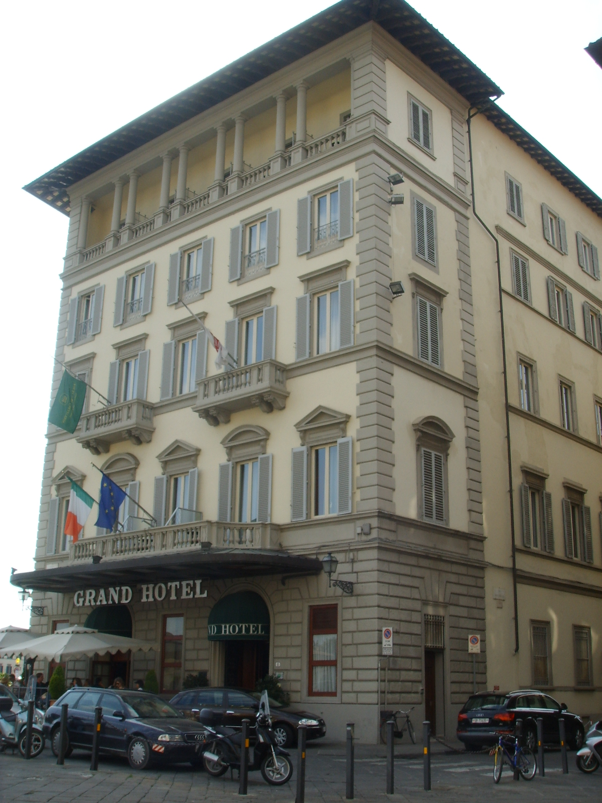 Palazzo giuntini, grand hotel